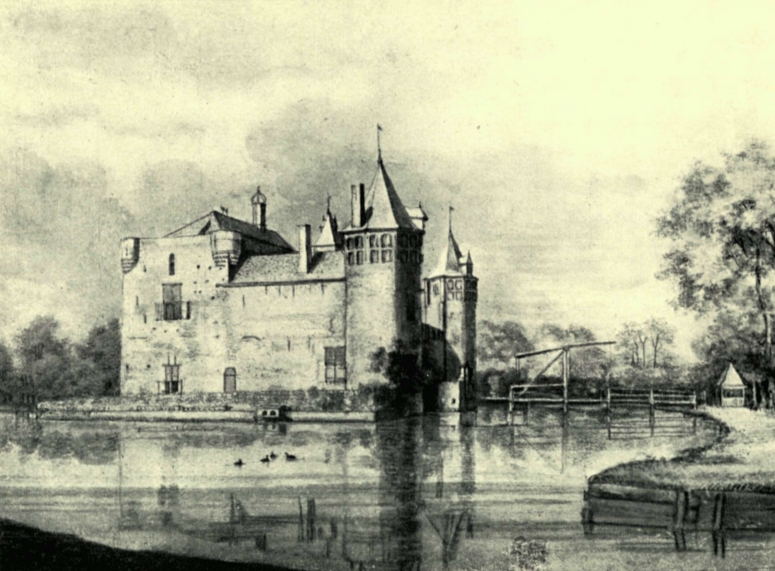 Het slot Valckesteyn omstreeks 1650, Naar een teekening van R. Rogman in het bezit van de erven van Jhr. Dr. W. A. Beelaerts van Blokland.